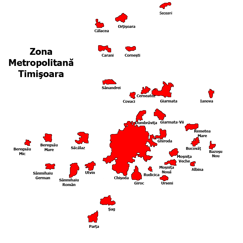 Categorie:Hărţi ale judeţului Timiş